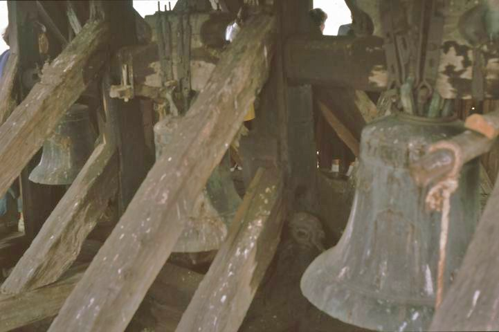 Kirchenburg Hundertbücheln (Movile) Glocken (1993)